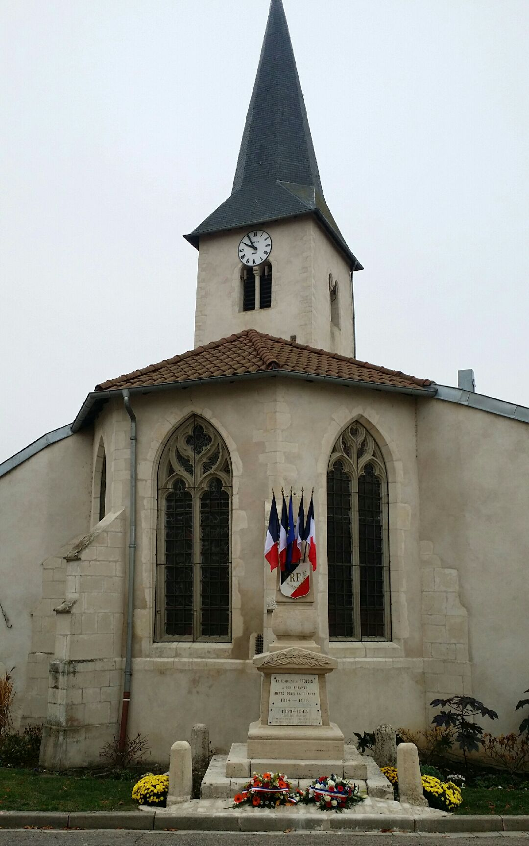 Église Saint-Martin